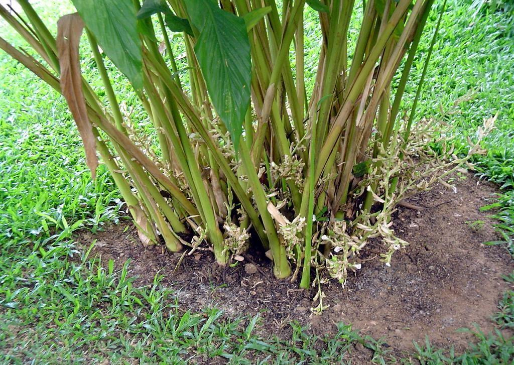 Cardomom plant